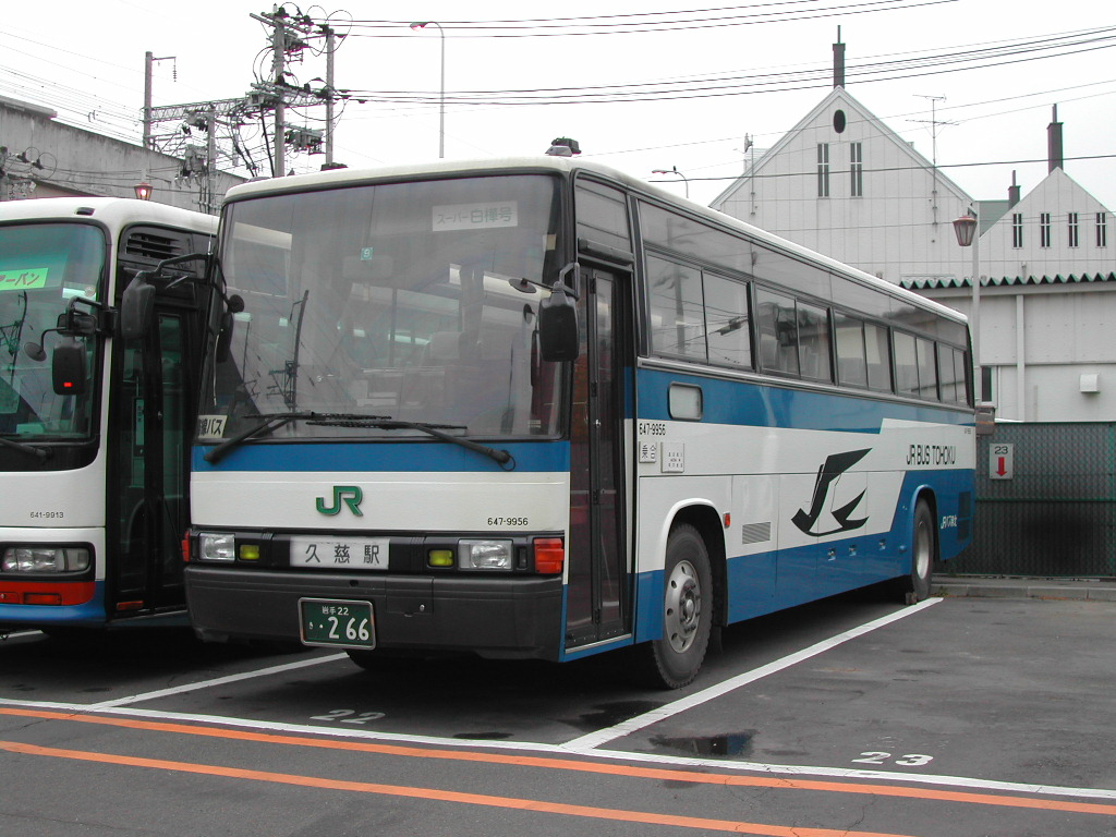 盛岡支店にて、2002-11-4 撮影